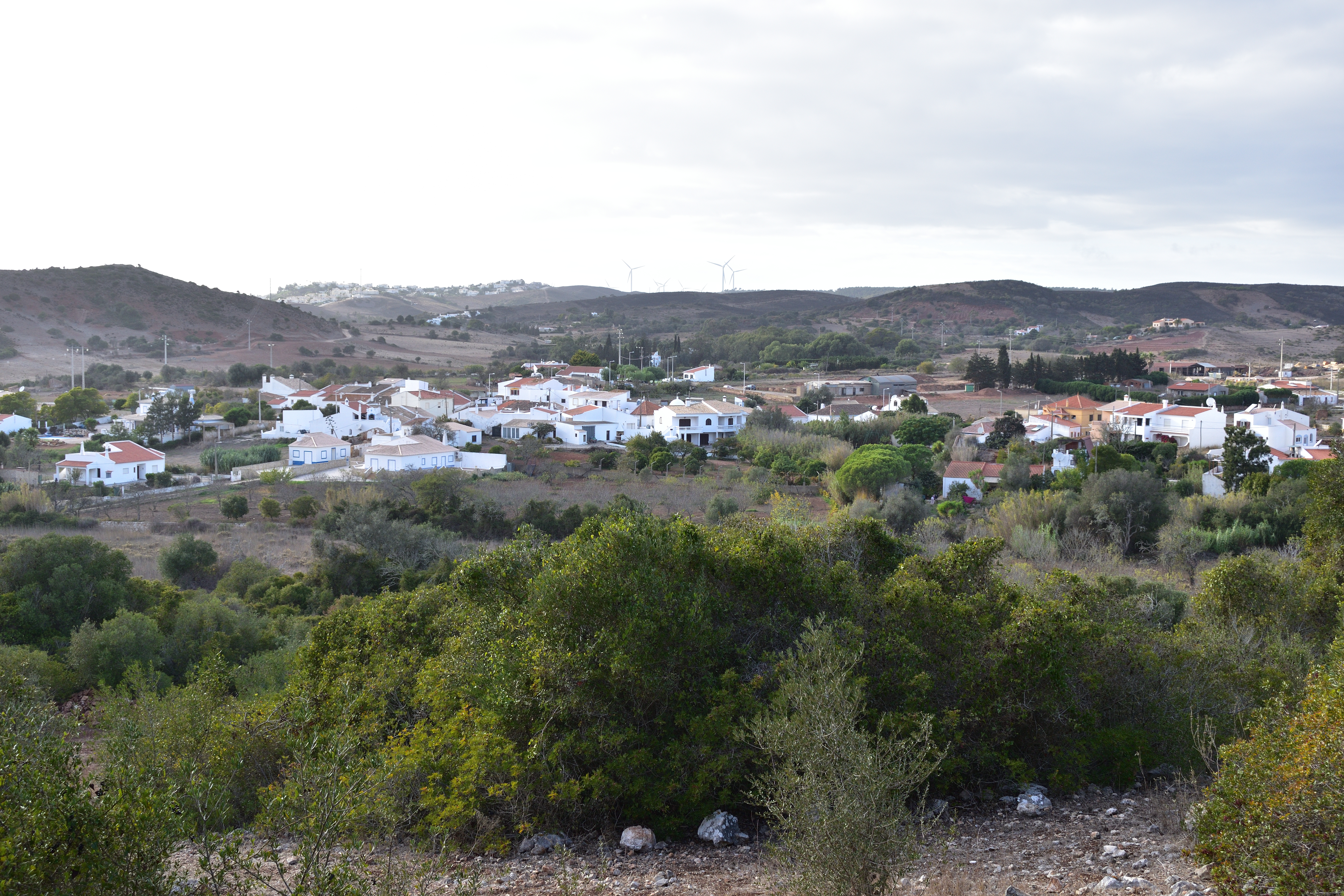 Aldeia de Vale de Boi, no concelho de Vila do Bispo, em Portugal.